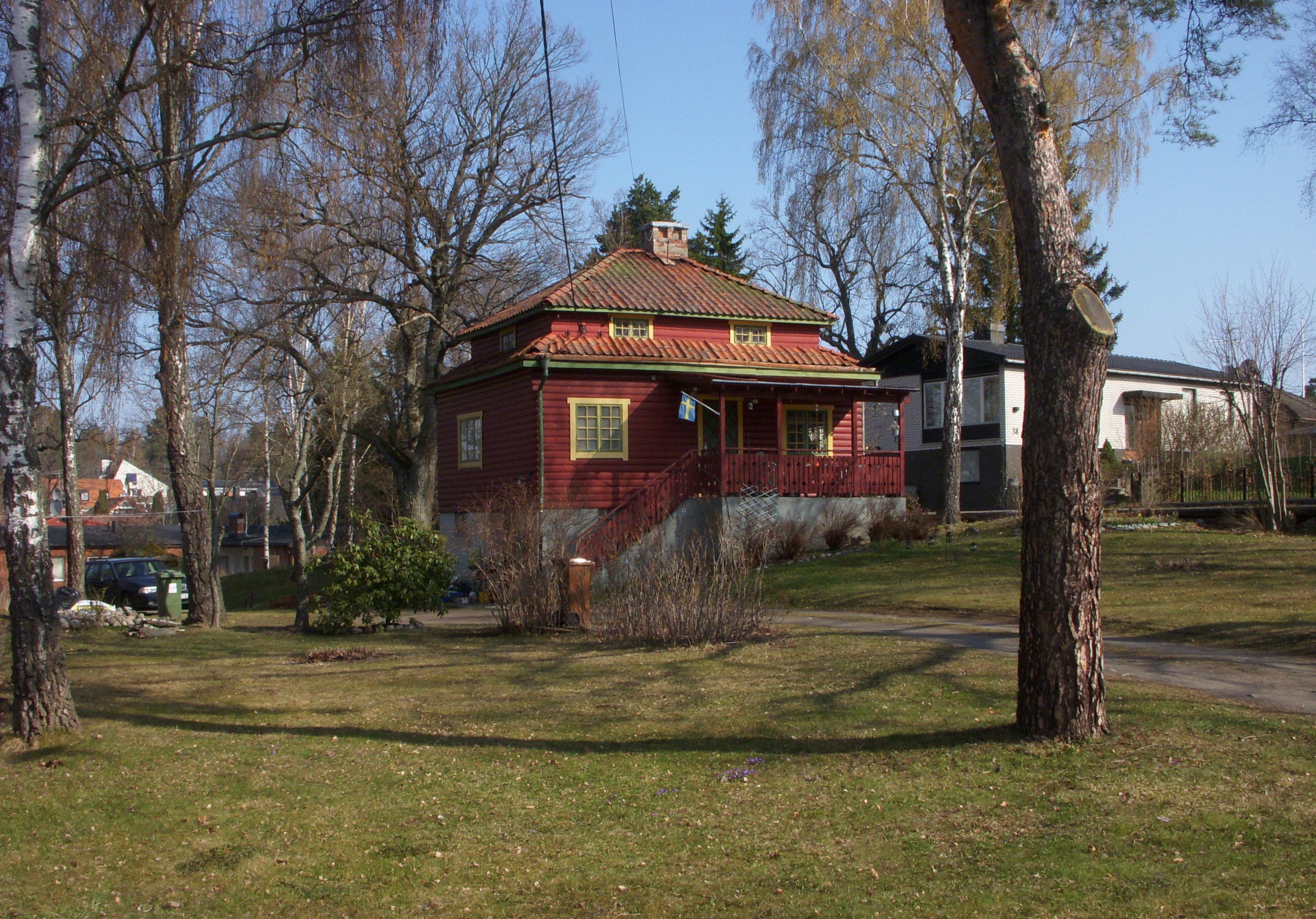 Äldre villabebyggelse i Segeltorp Gårdsvägen